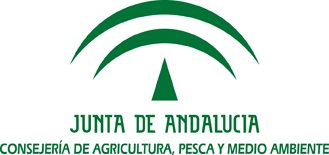 Consejería de Agricultura, Pesca y Medio Ambiente